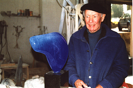 Lucien Wercollier in seiner Werkstatt mit der "pâte de verre" "poisson"